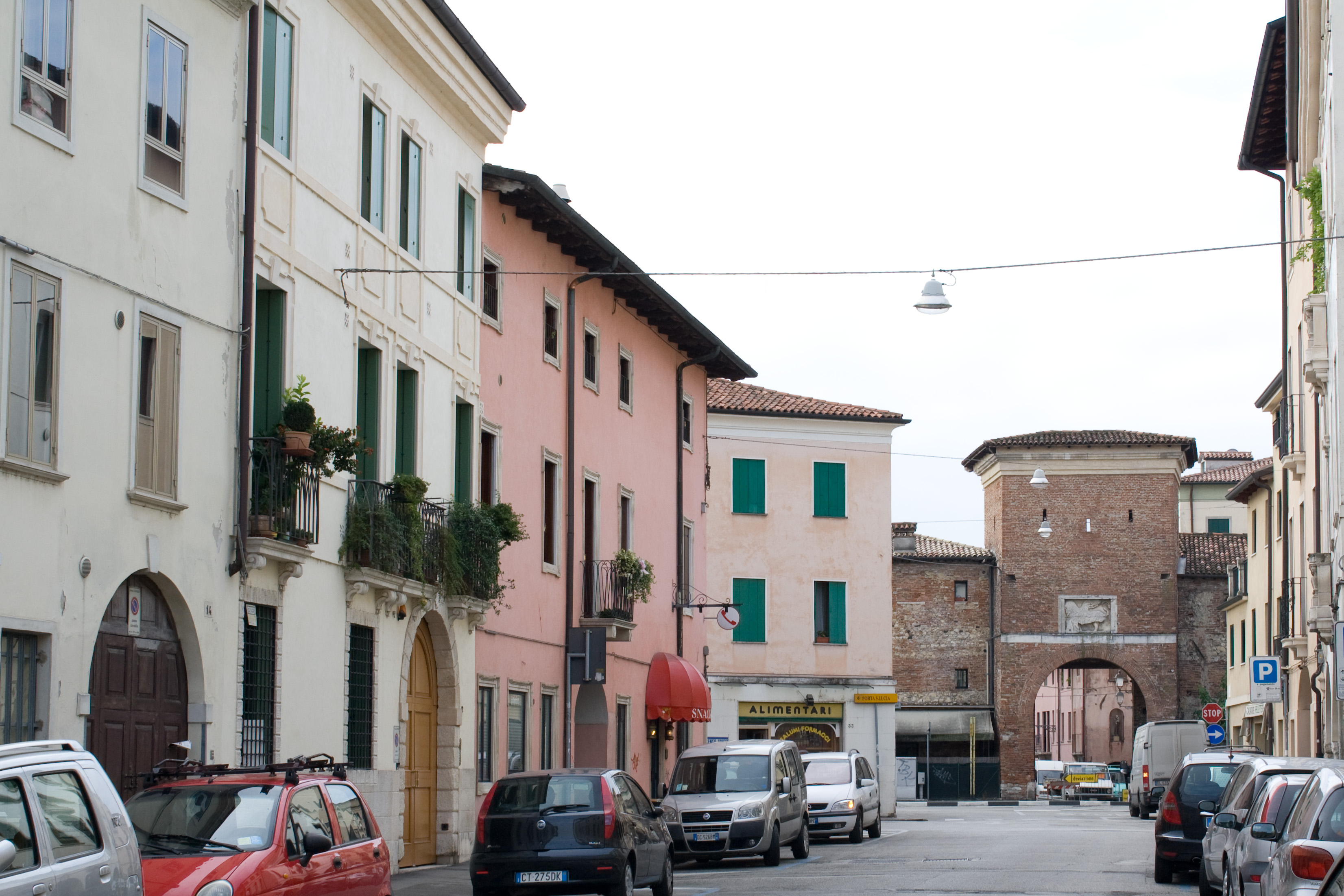 Borgo Santa Lucia a Vicenza